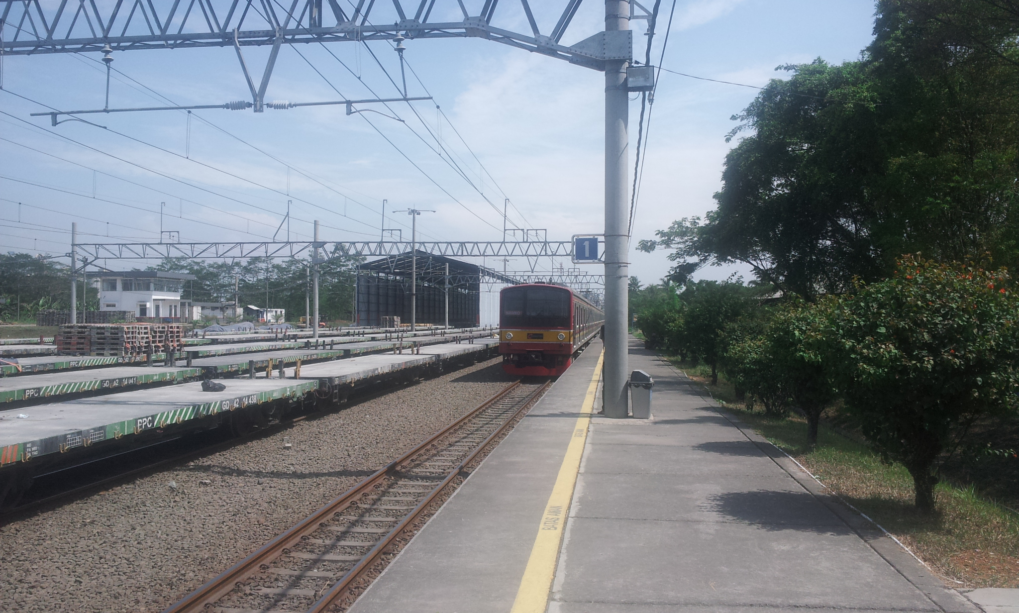 KRL Commuter Line tiba di Stasiun Nambo